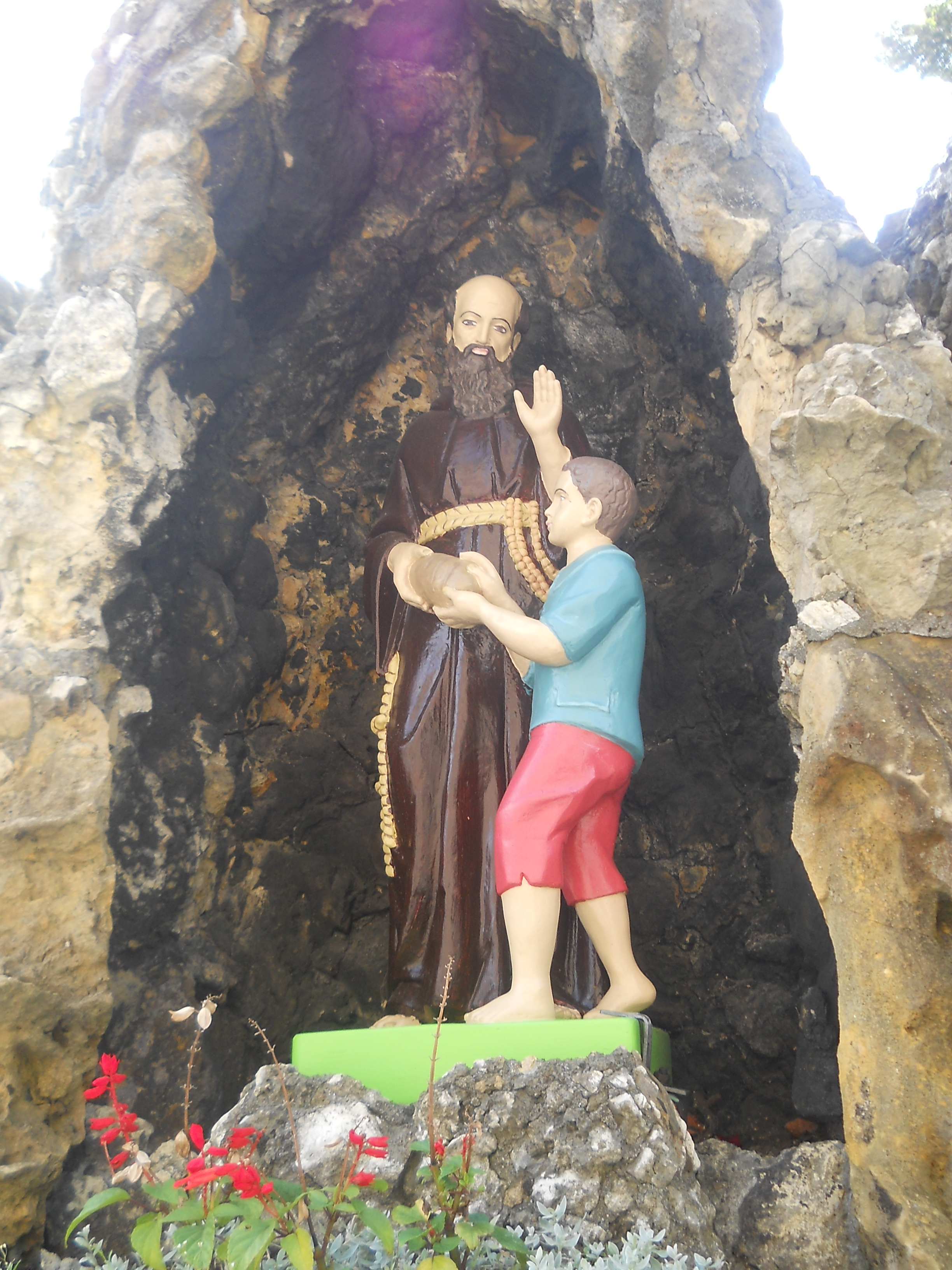 kościół par. p.w. św. Mikołaja - grota przykościelna - Pyskowice, ul. Poniatowskiego